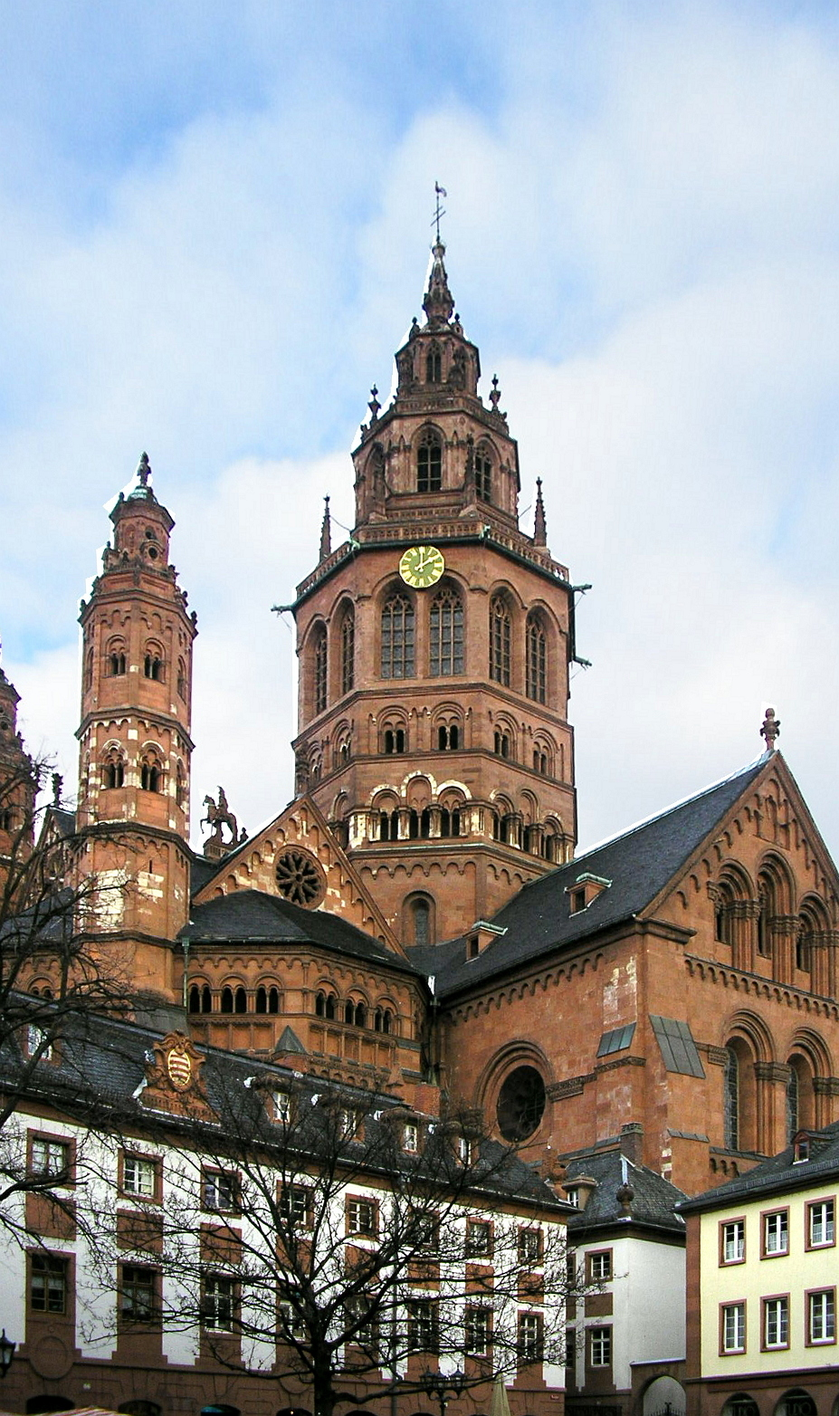 Der Mainzer Dom von Südwesten // Cathedral of Mainz from Southwest